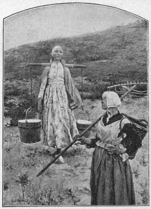 In den Dünen